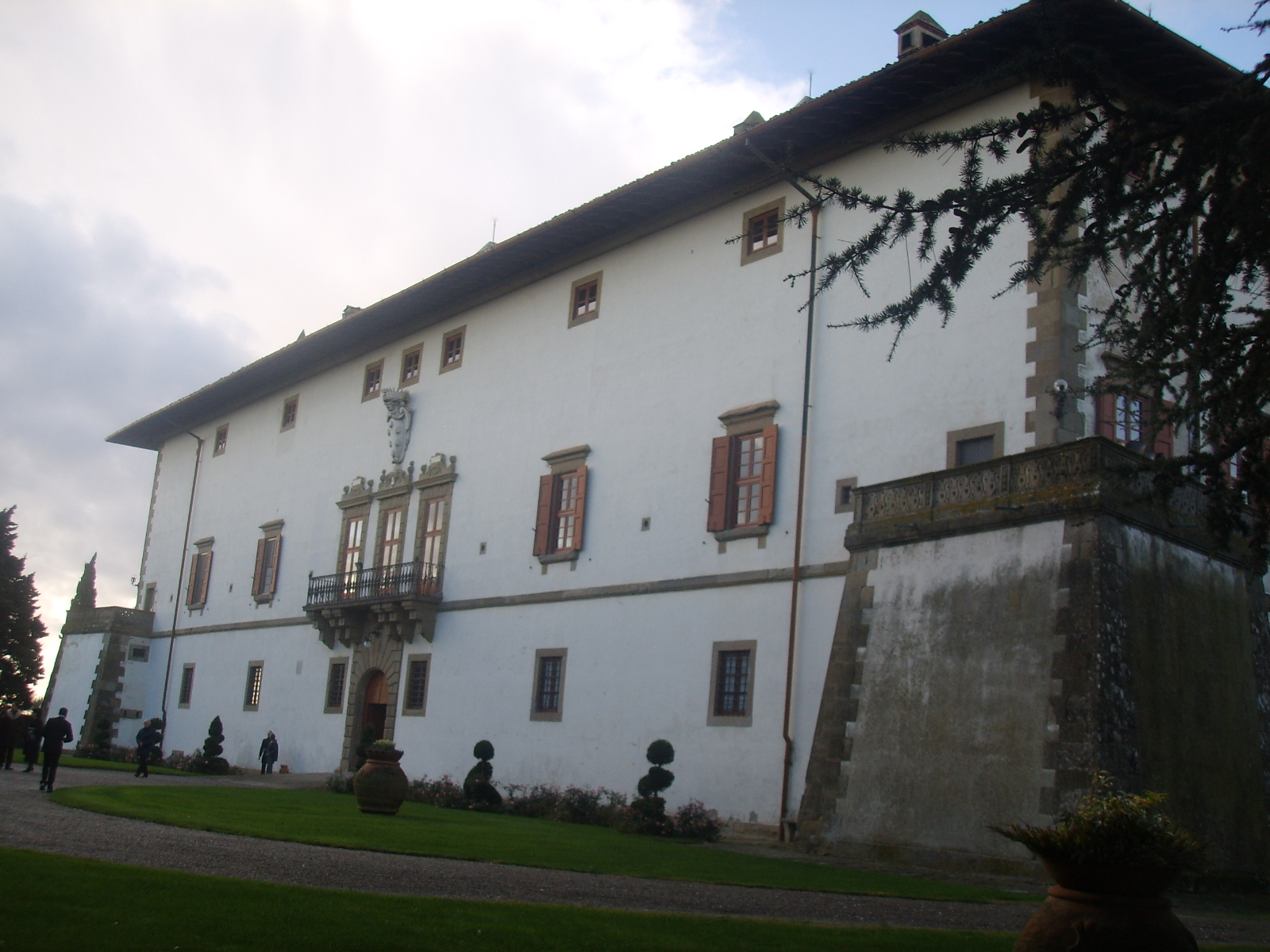 Villa_di_Artimino Medici villa in Artimino